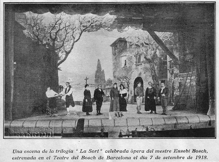 Estreno de la trilogía La Sort, obra compuesta por Eusebio Bosch i Humet